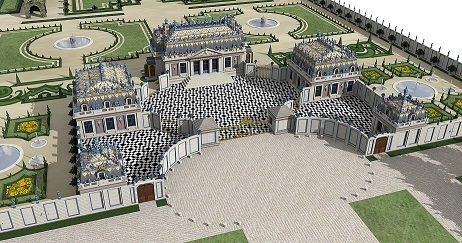 Restitution 3D du Trianon de Porcelaine à Versailles